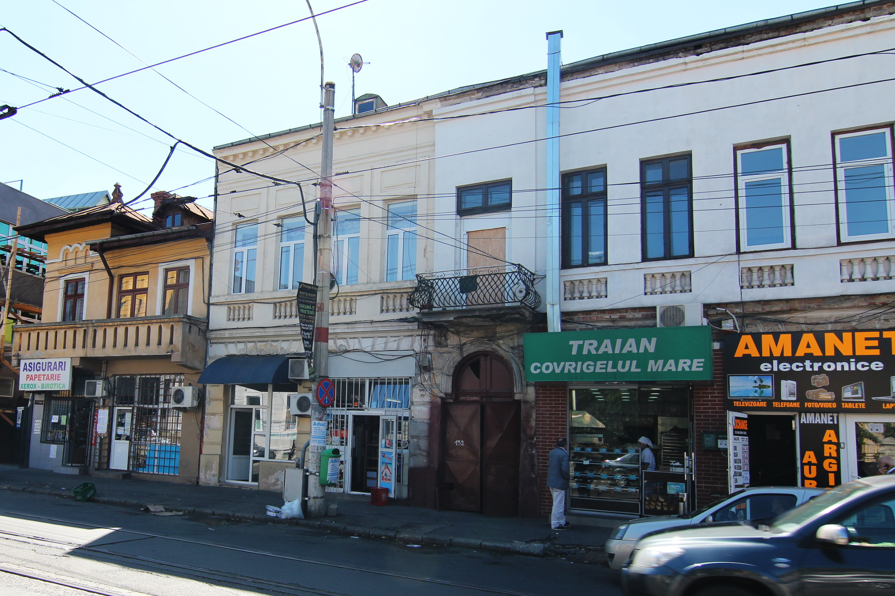 Casă pe Calea Călărașilor